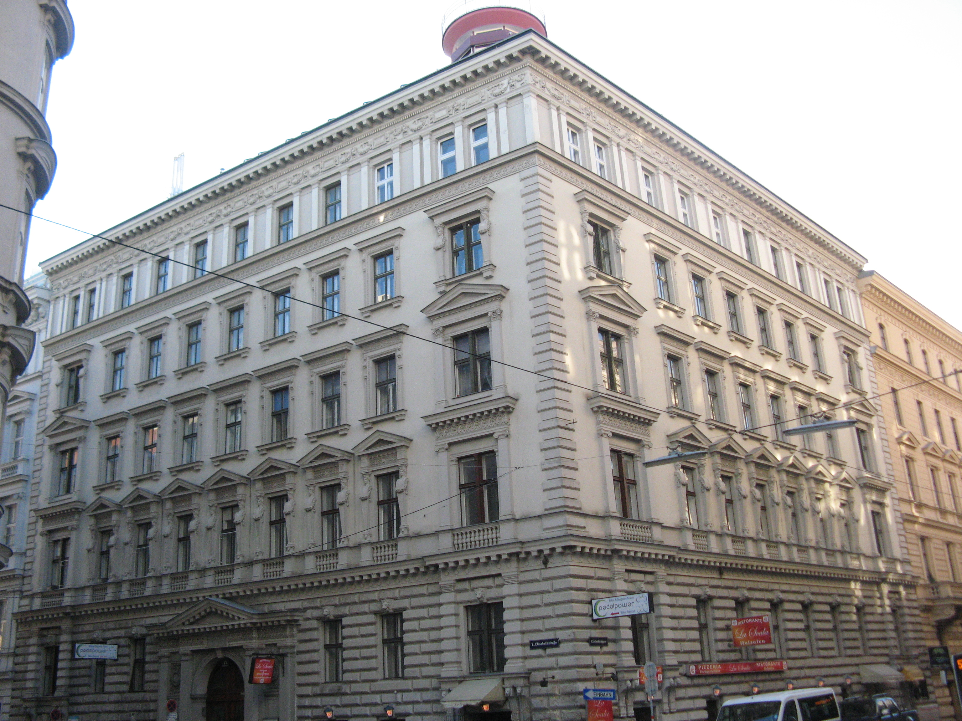 Eckhaus(1870-71) von Josef Hudetz, Elisabethstraße 13, Wien-Innere Stadt